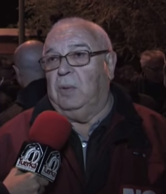 Víctor Díaz Cardiel piquete en La Elipa.